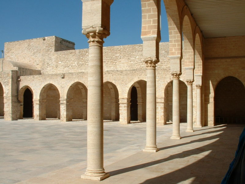 Photographie personnelle (Asram) prise à l'intérieur de la Grande Mosquée de Mahdia (Tunisie)